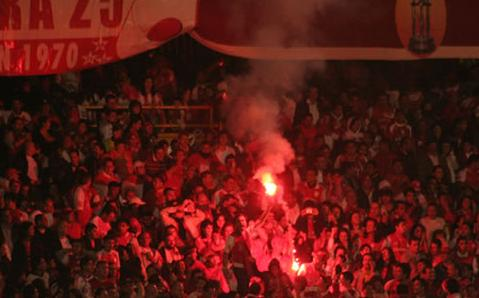 Hichadasantafe